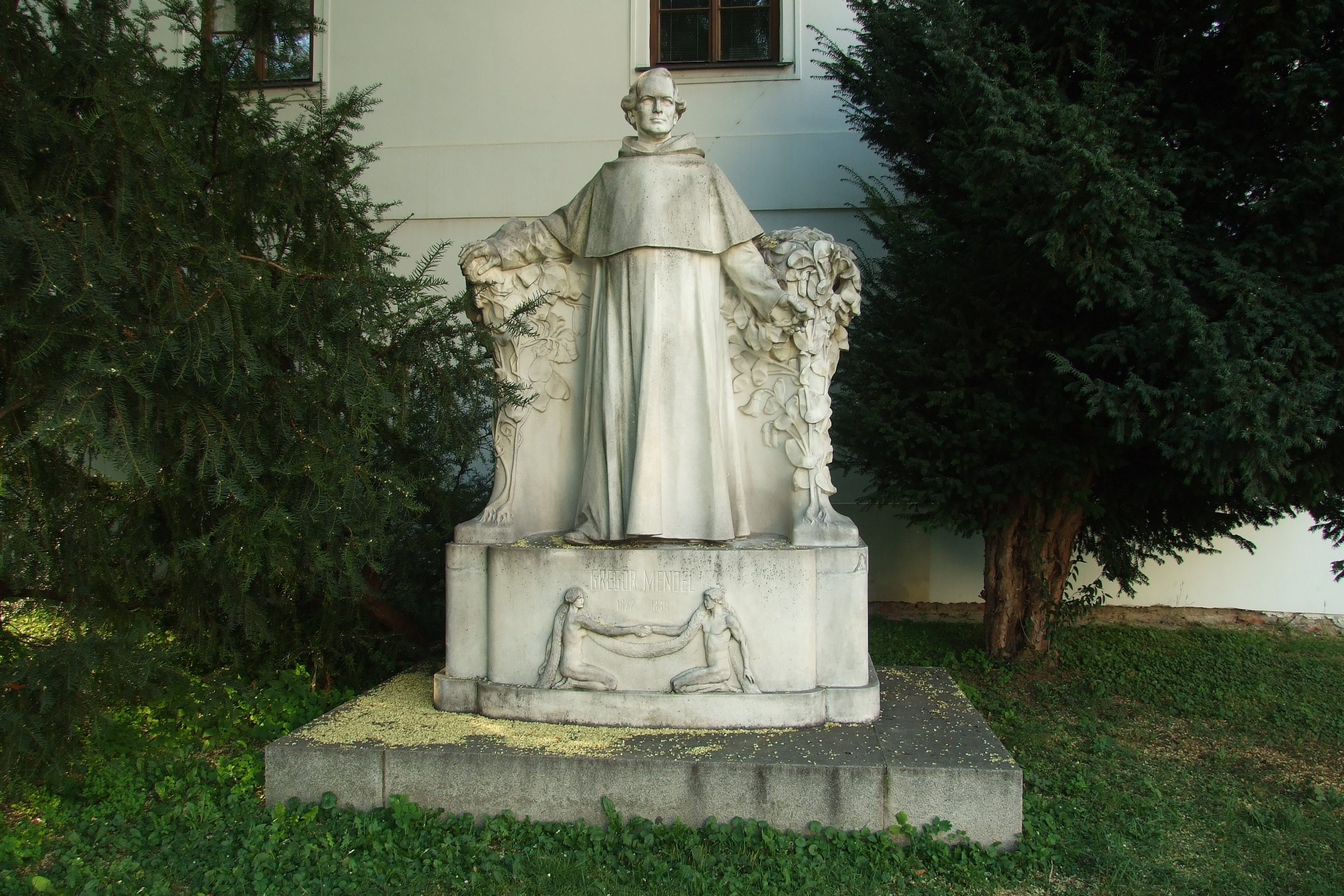 Pomník J.G.Mendela v areálu Mendeliána na Starém Brně. Pomník se původně nacházel na dnešním Mendelově náměstí.